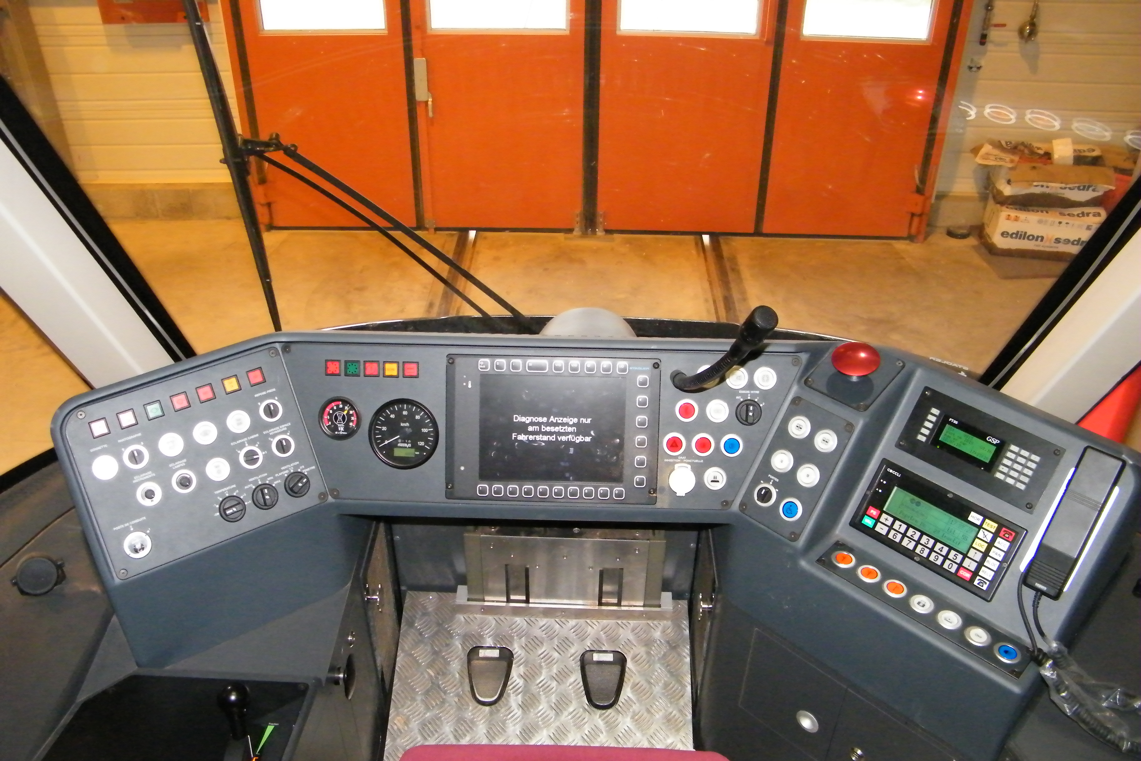 Vue du pupitre de pilotage d'une rame Rhônexpress.